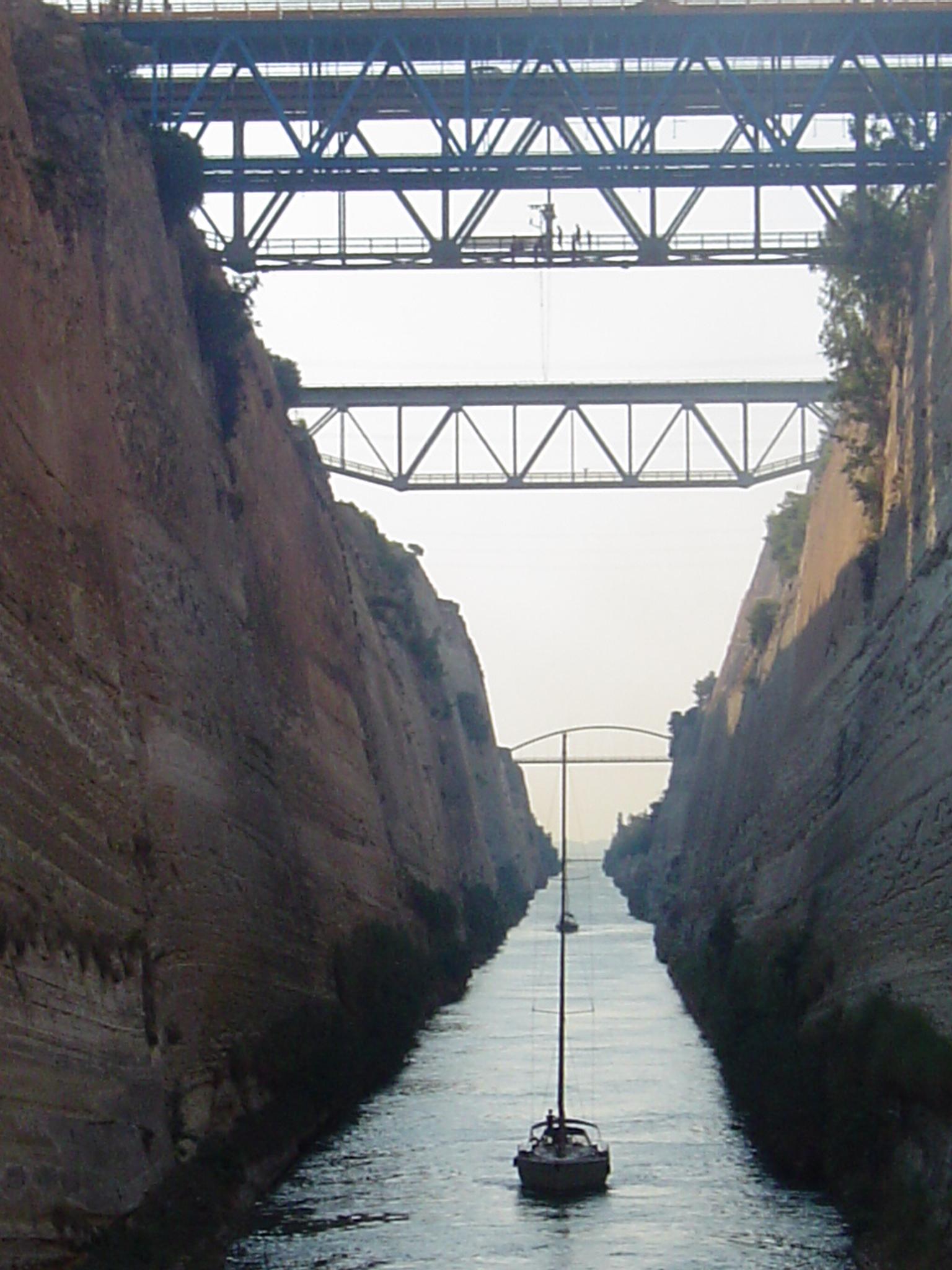 Sujet: Mëtt vum Kanal vu Corinth.